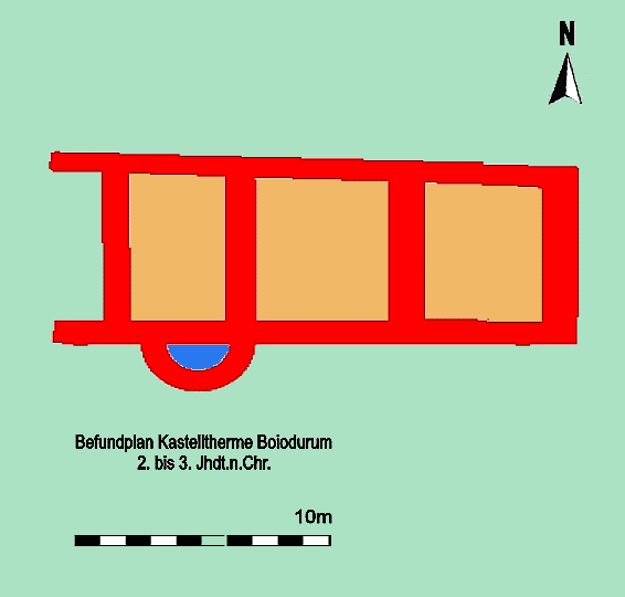 Befundplan der Lagertherme des Kastell Boiodurum (Passau-Innstadt/Rosenau, D), Forschungsstand 1998.